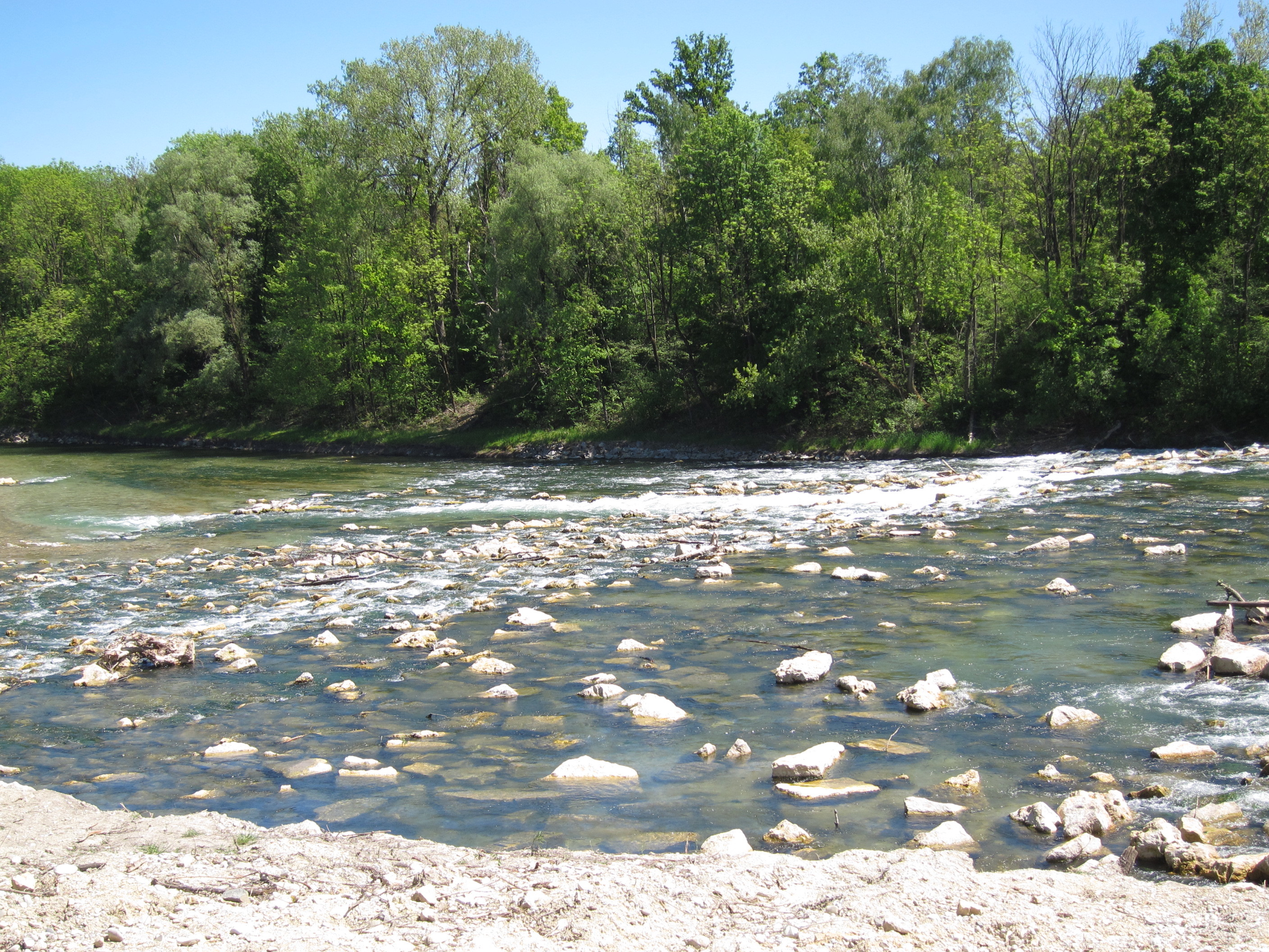 Isar-Renaturierung, Sohlrampe bei Unterföhring